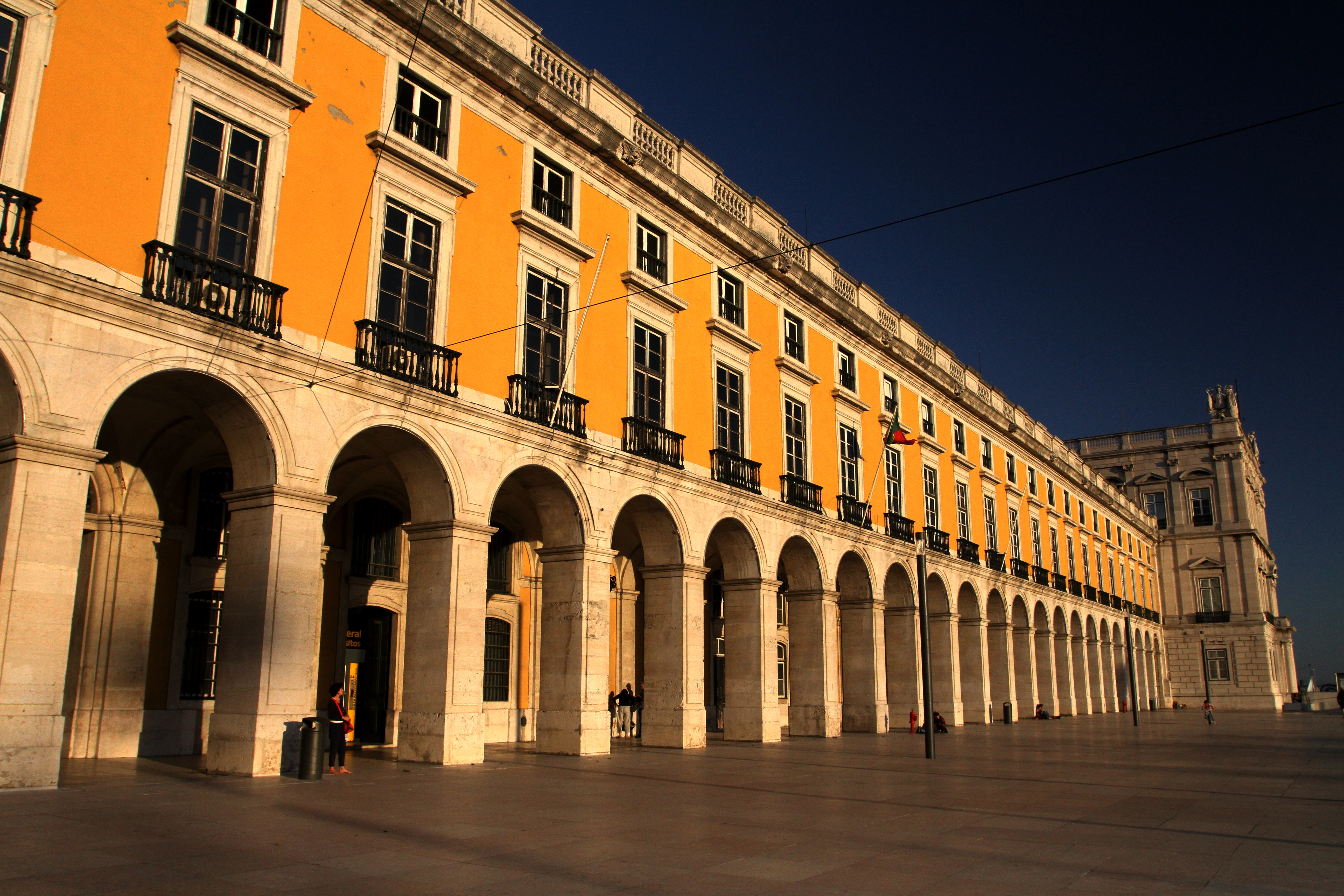 Praça do Comércio This file was uploaded for Wiki Loves Monuments in Portugal with the unique identifier 70275.